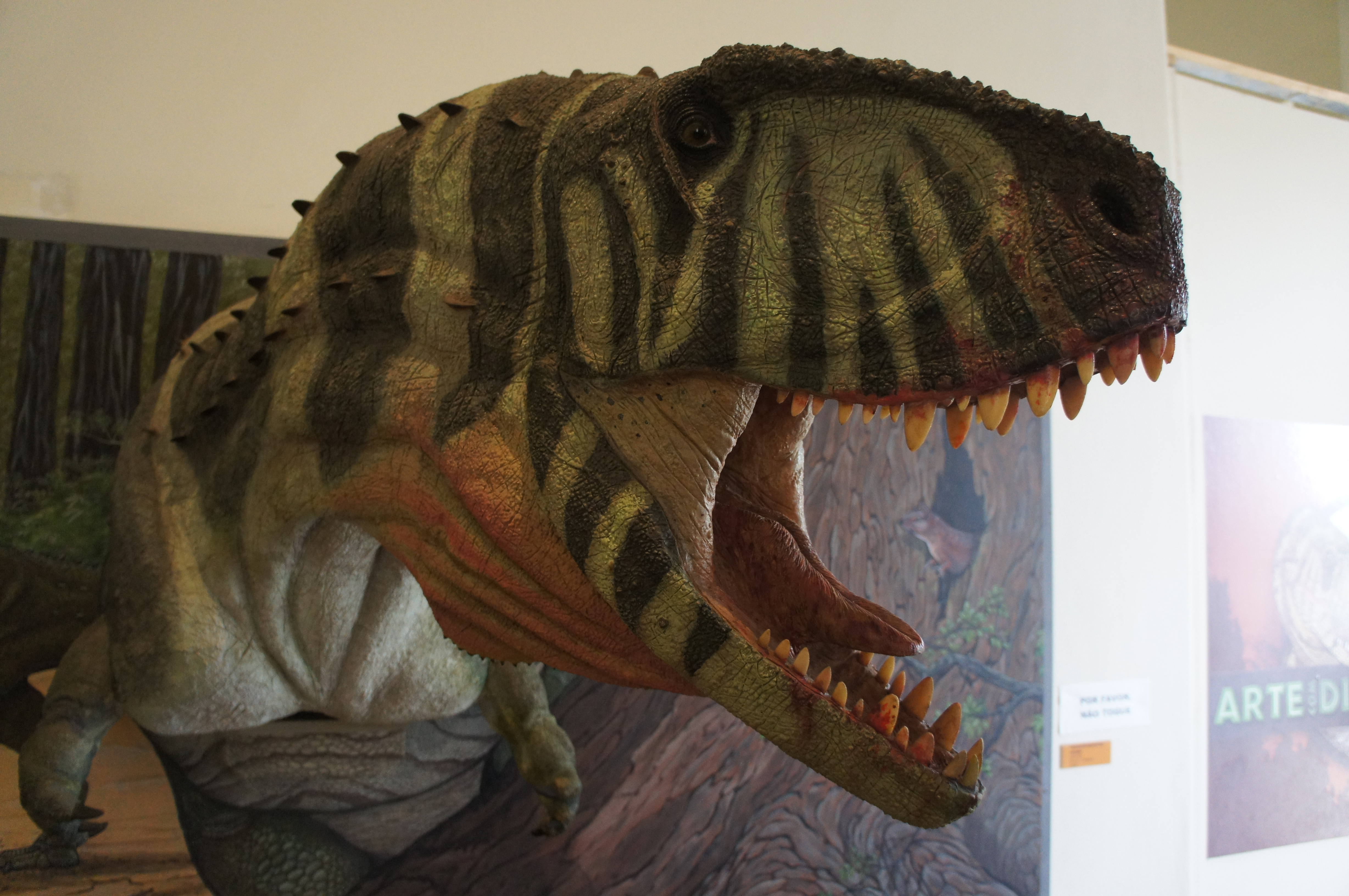 detalhe de cabeça de reconstrução de dinossauro II